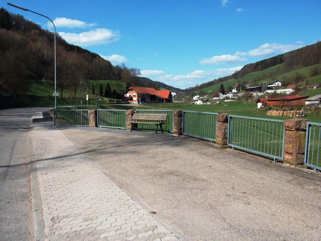 Sensbachtal, in der Bildmitte das Anwesen Hauptstr. 5 in Unter-Sensbach